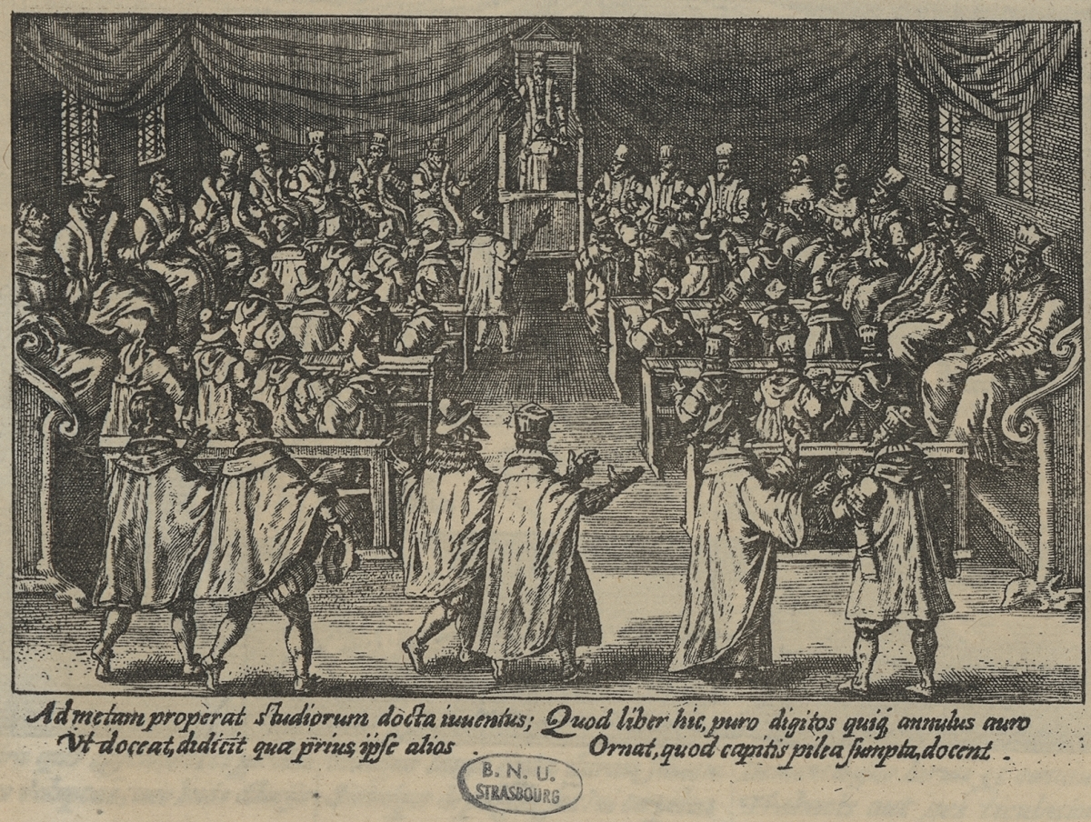 Scène d'enseignement au XVIe siècle - coll. BNUS.